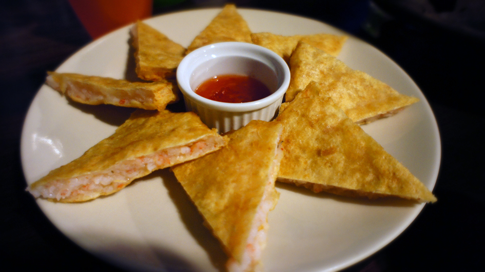 中文（台灣）: 泰式月亮蝦餅